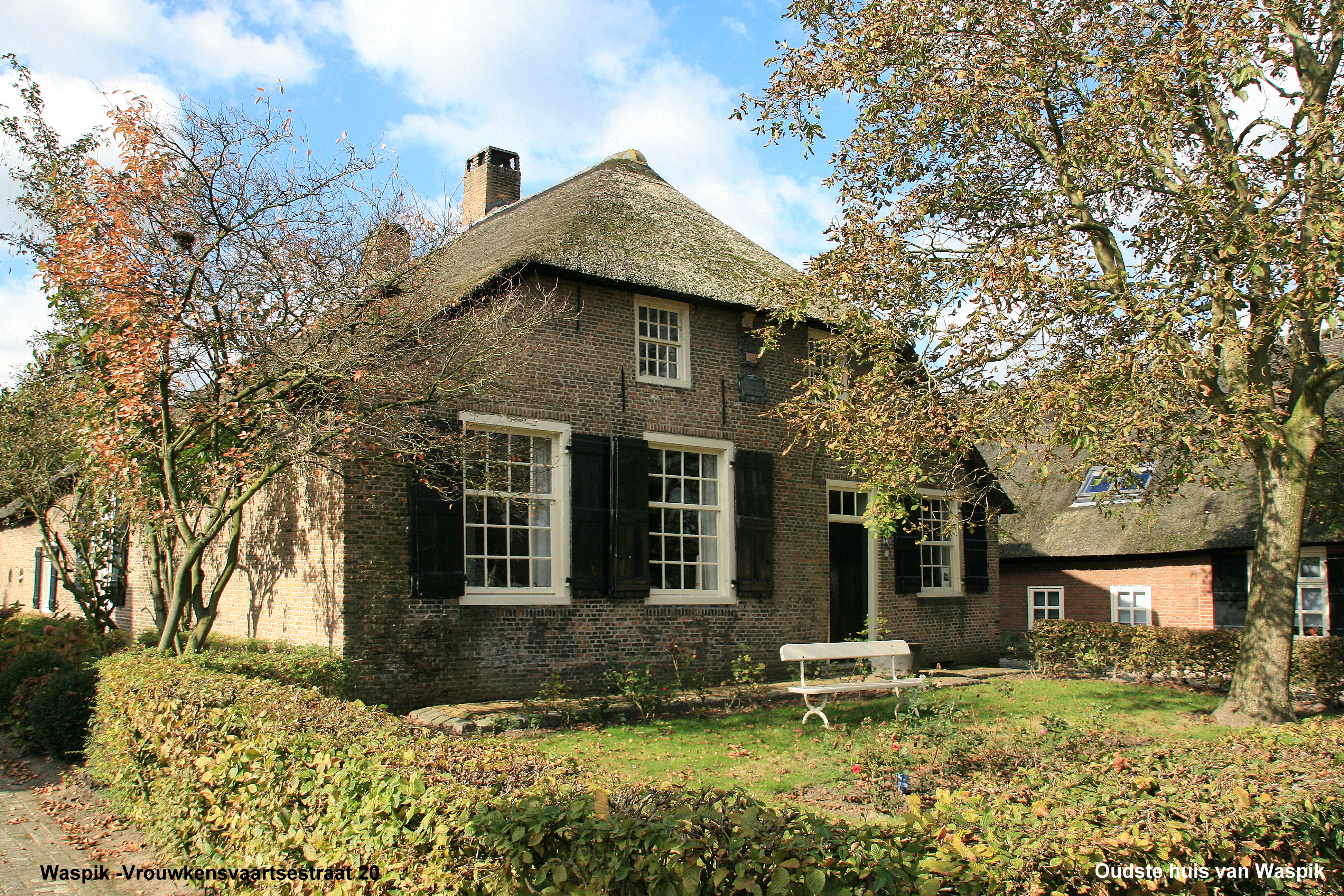 De bouwer van het oudste huis van Waspik was, Jochem Jan Berhoutse (1550-1625). Tijdens de ellendige oorlogstijd waarin hij leefde, zette hij zich onvermoeibaar in voor de belangen van Waspik en omgeving. Door gevaar, tegenwerking en tegenslag liet hij zich niet uit het veld slaan. Op één van zijn missies naar Brussel werd hij gegijzeld.